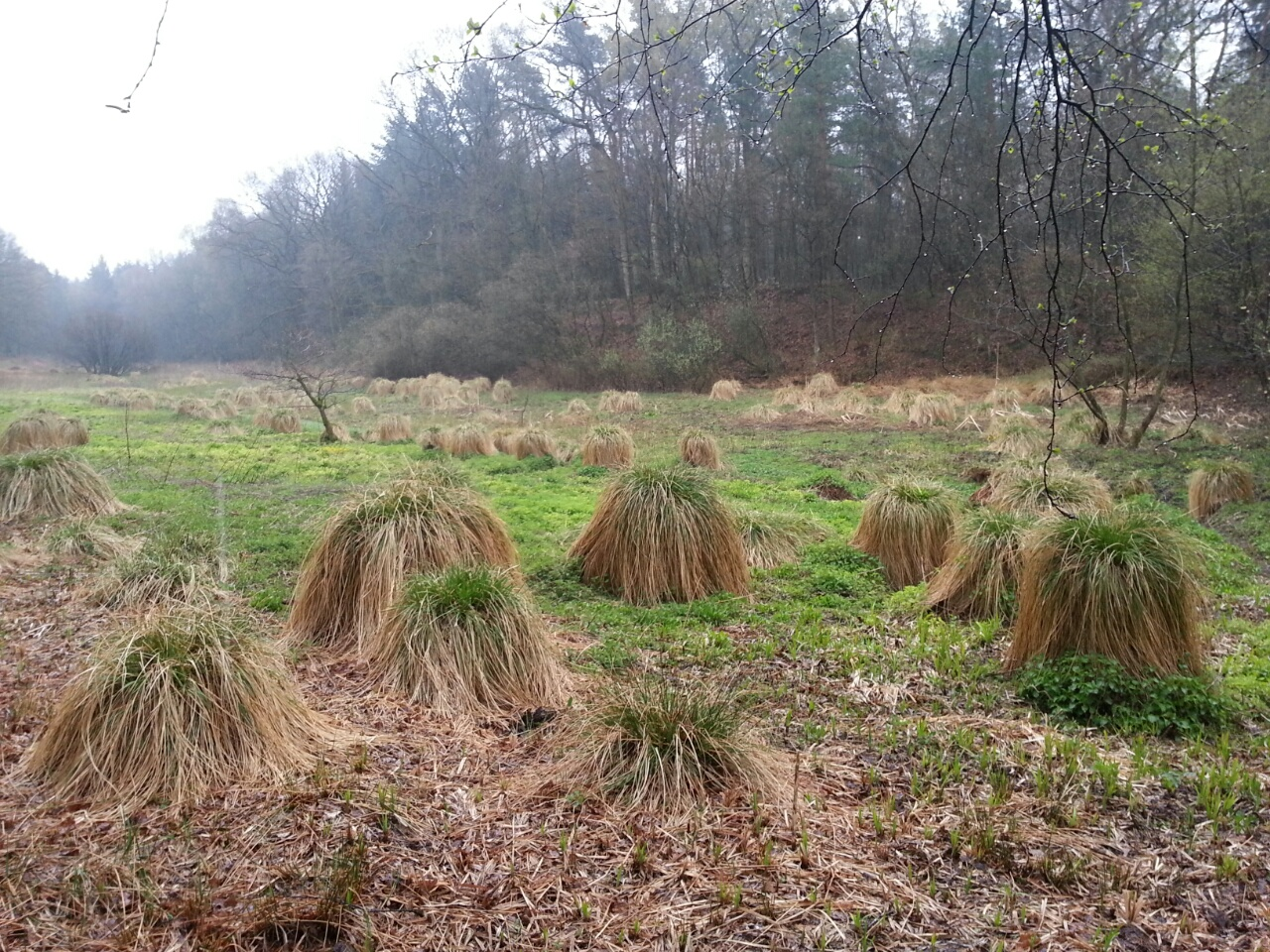 Das Naturschutzgebiet Poggenpohl in Ostrittrum bei Oldenburg (Oldb)